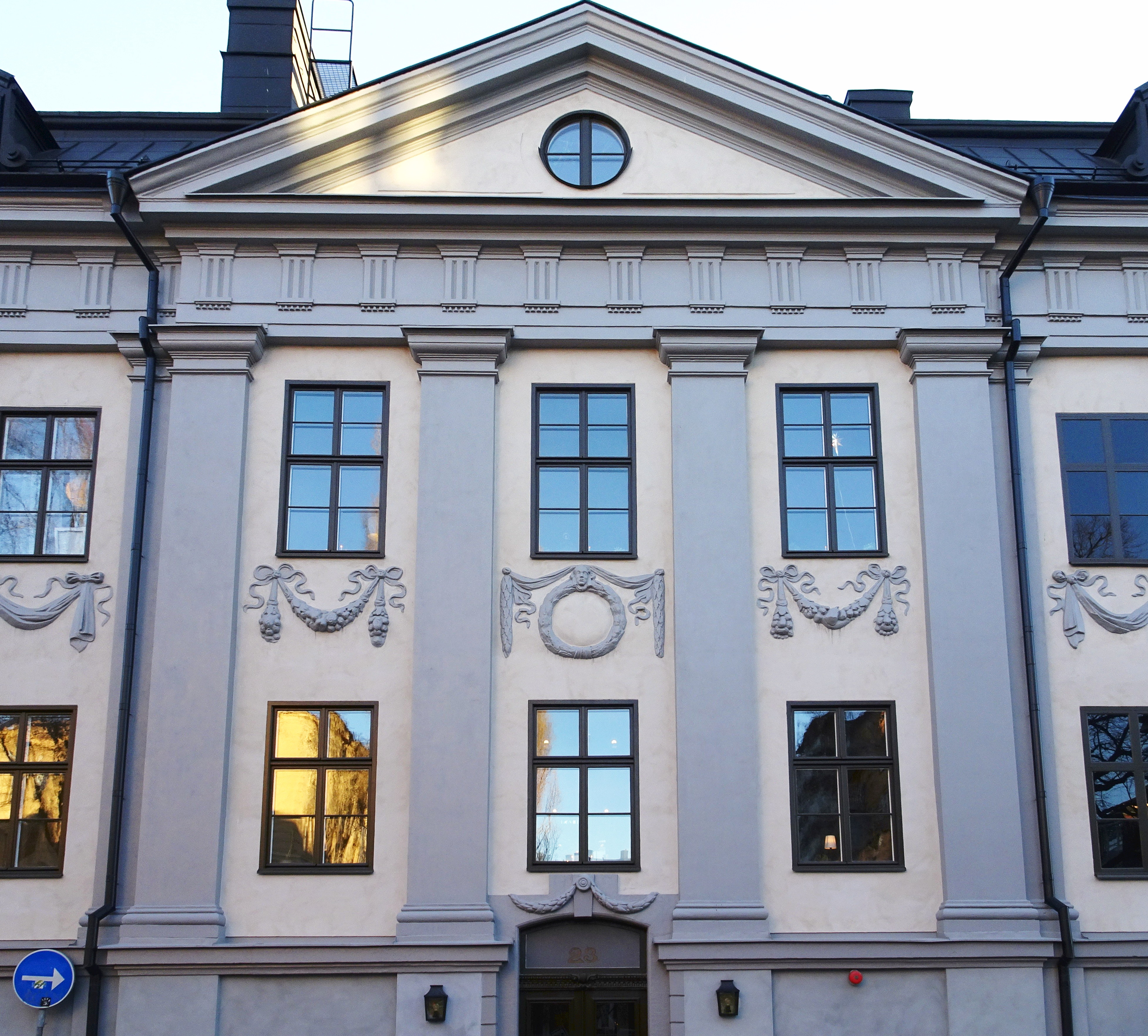 Reenstiernska palatset på Södermalm